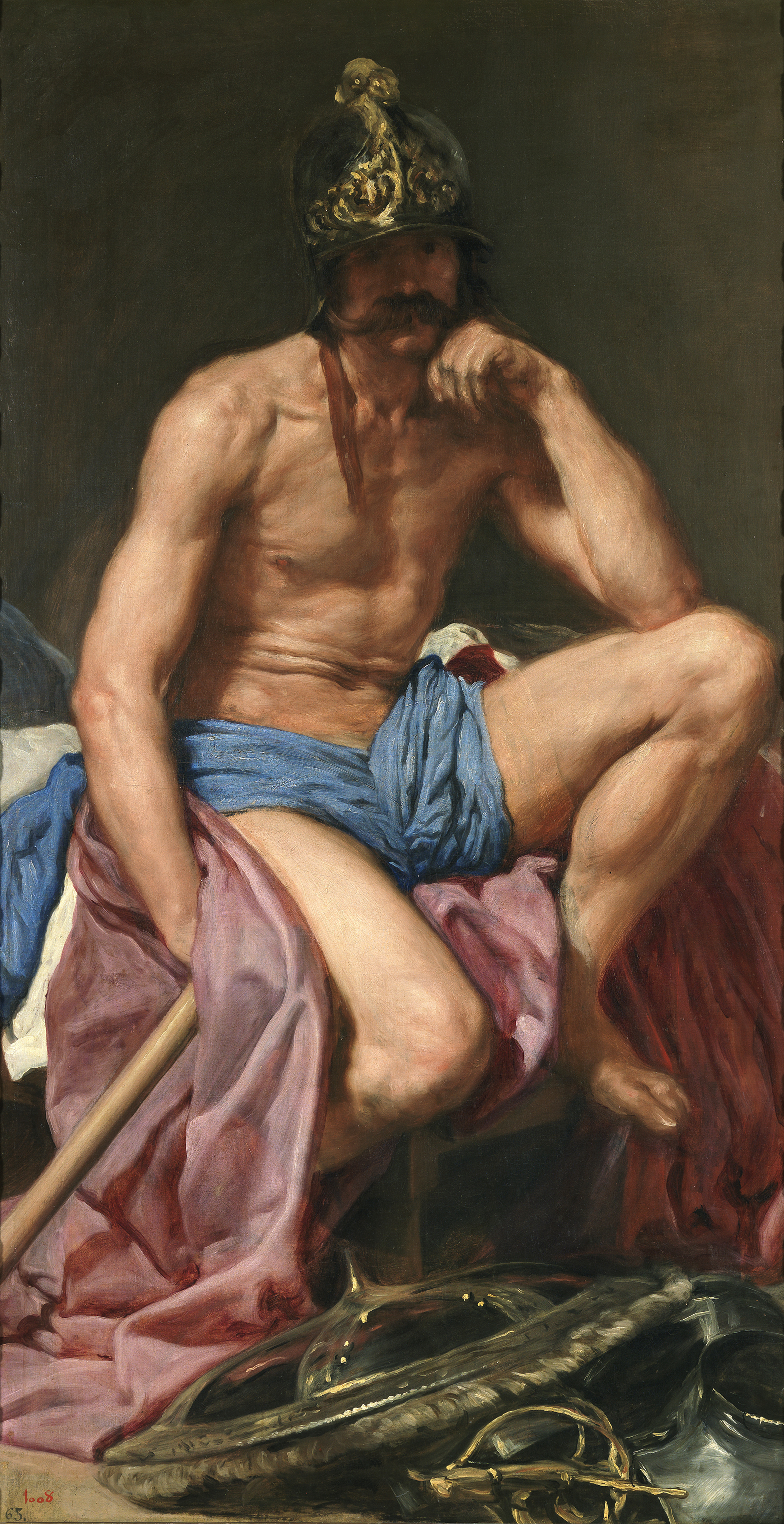 La obra representa a Marte, el dios de la guerra, y es una de las obras de temática mitológica del pintor sevillano Diego Velázquez.